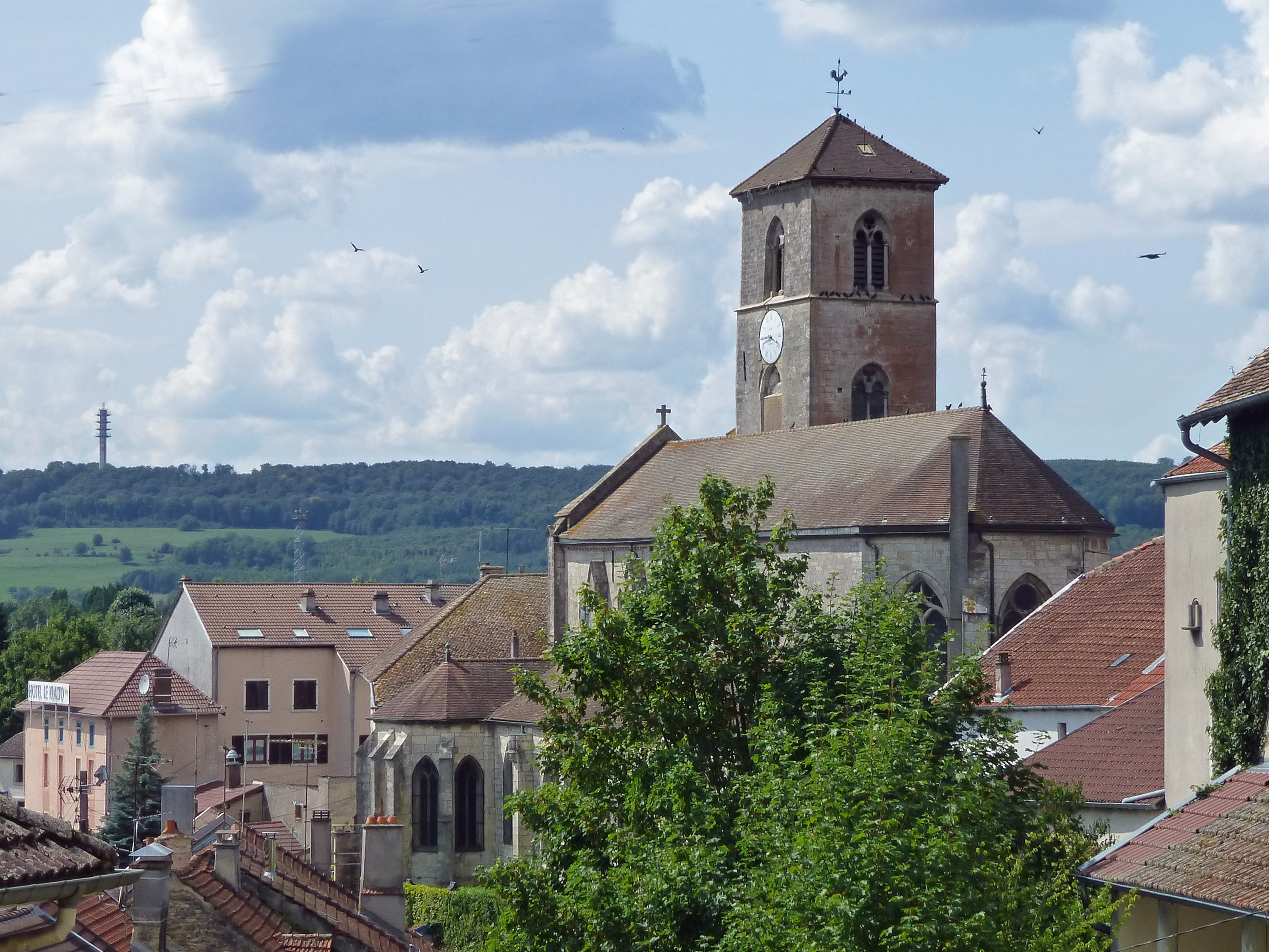 Église Saint-Christophe de Neufchâteau (Vosges)